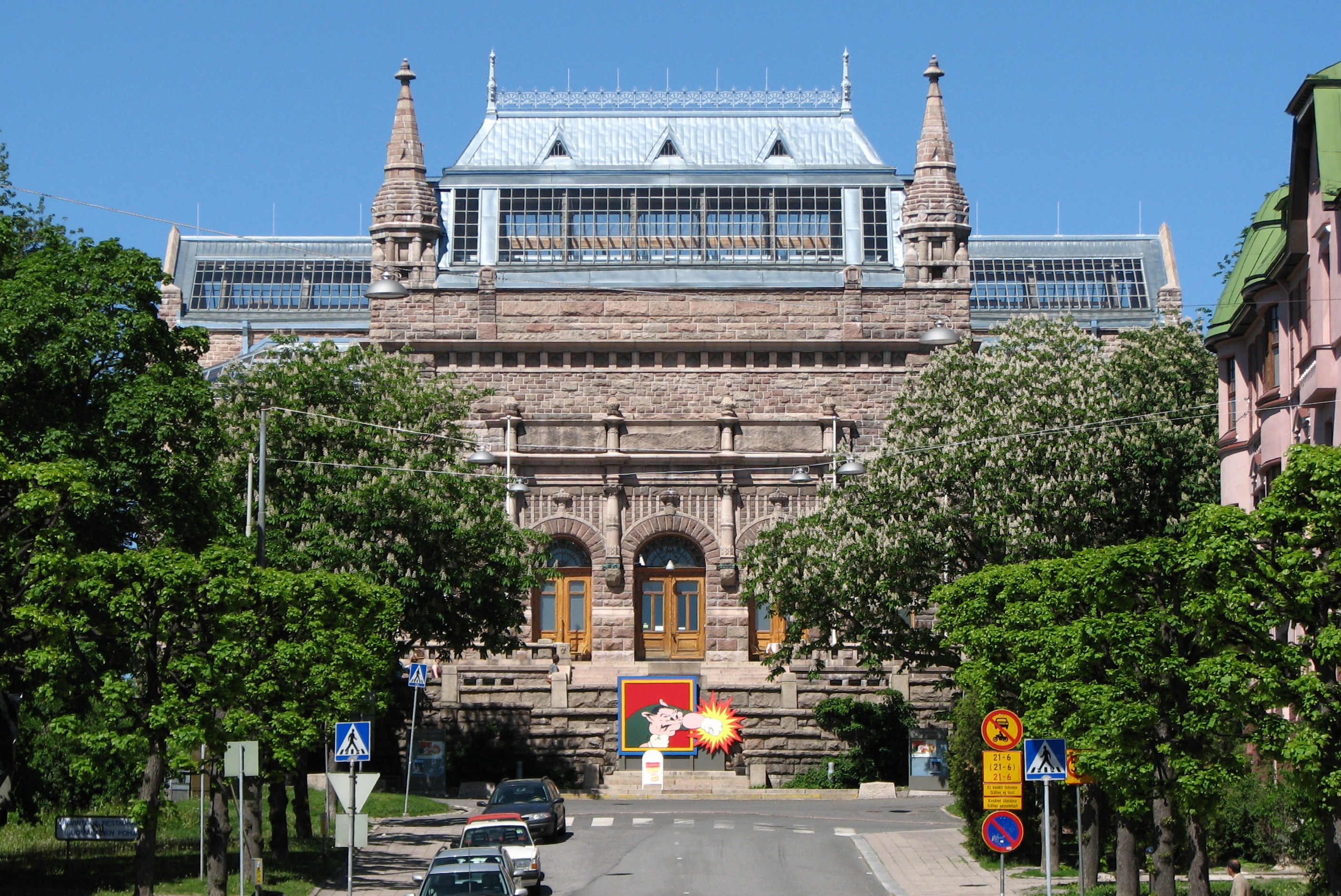 Turku Museum of Art in Turku, Finland